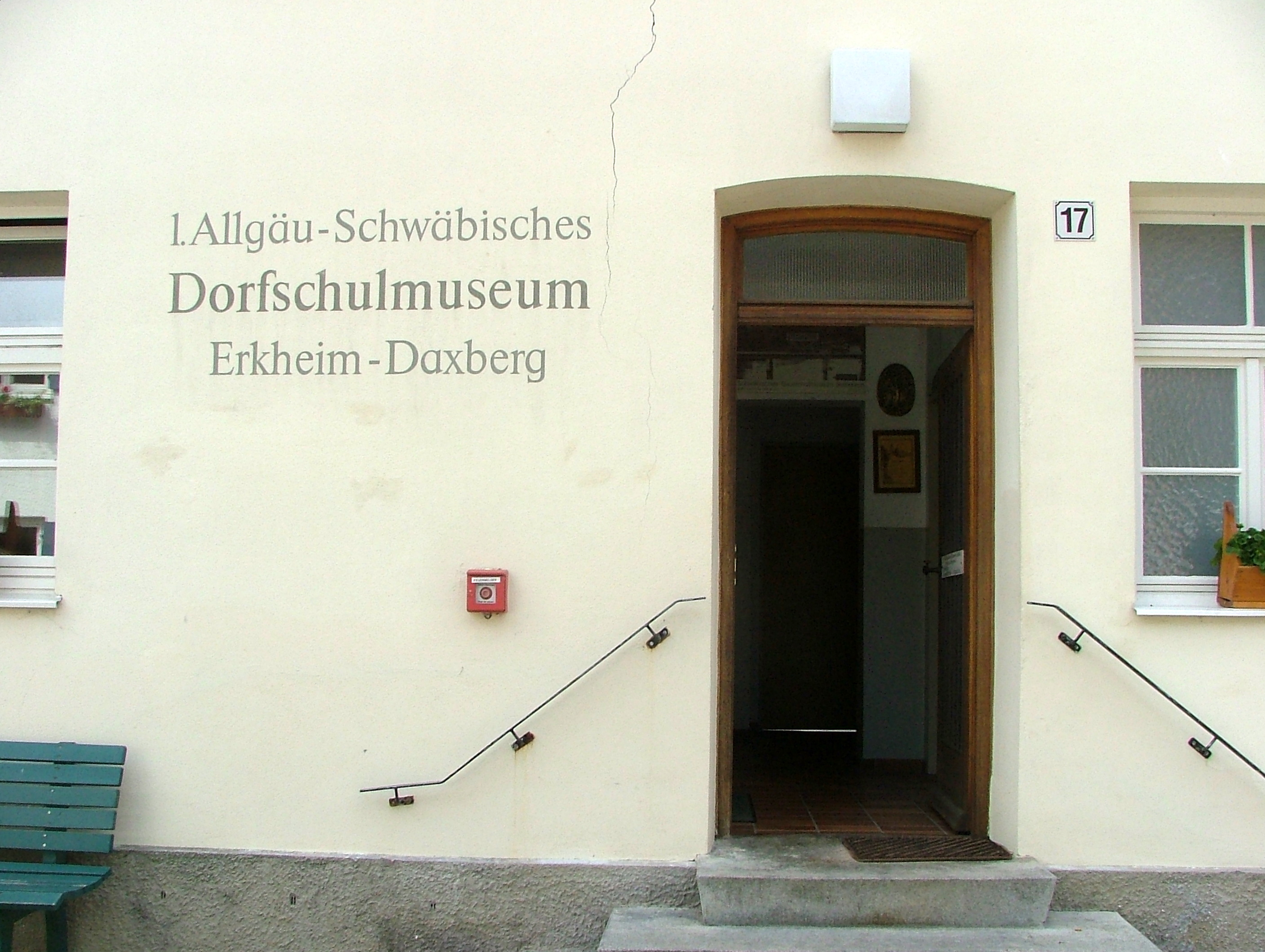 Daxberg